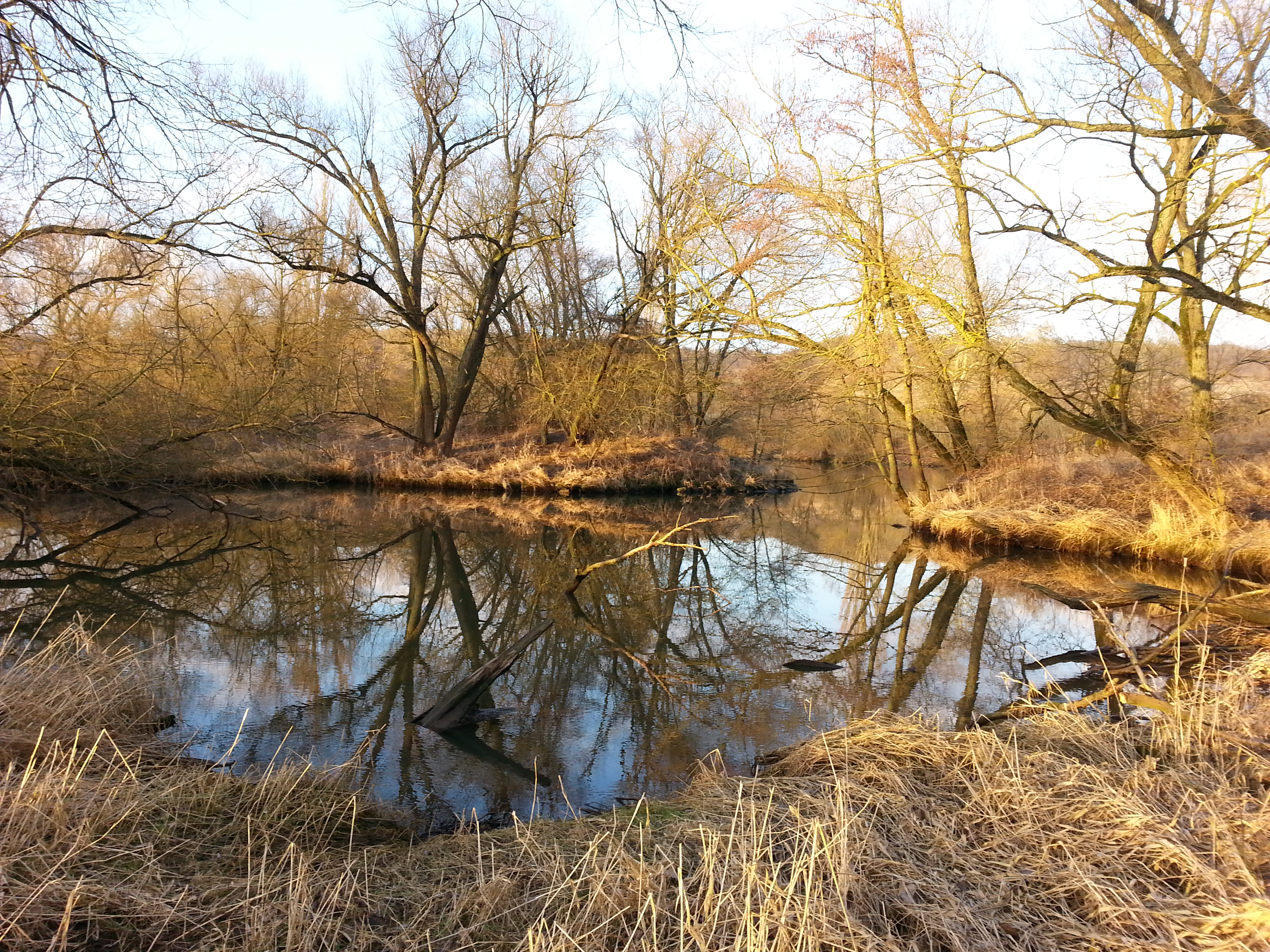 Naturschutzgebiet Altmain und Sandmagerrasen bei Limbach, Unterfranken